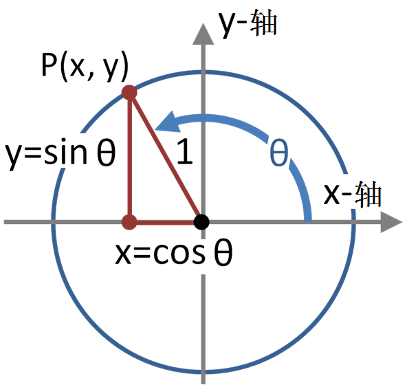 单位圆上的三角函数定义